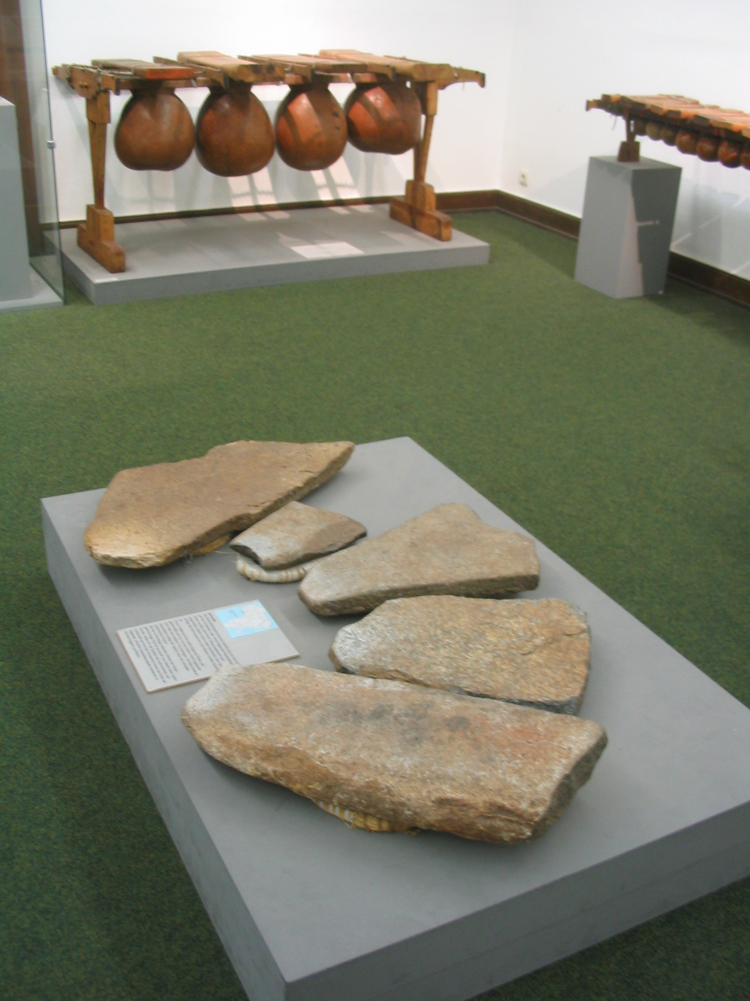 Lifòfon africà al Museu d'instruments musicals de Berlin